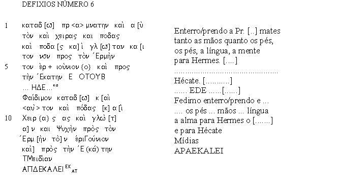 Katádesmos